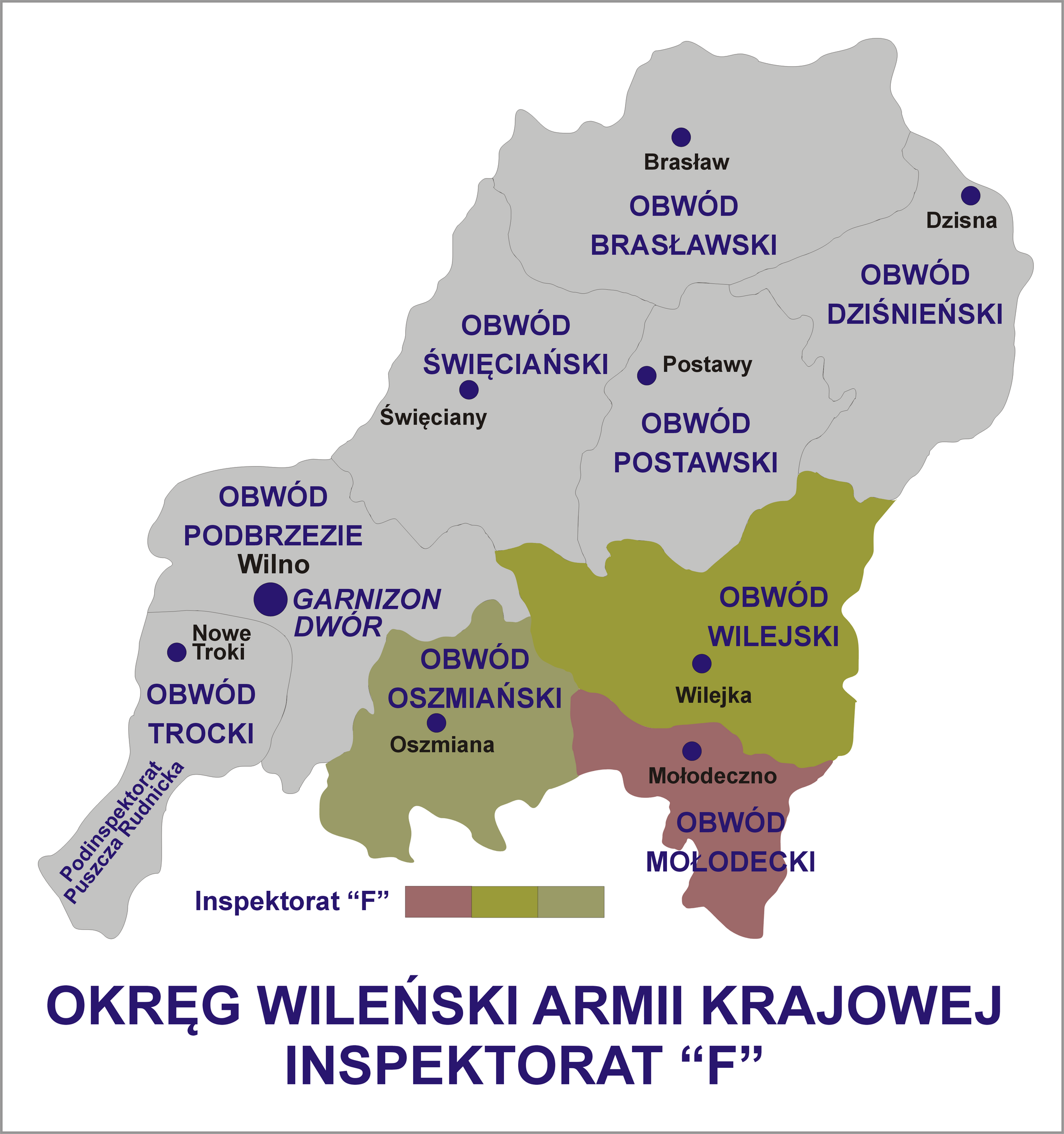 Okręg Wileński Armii Krajowej - Inspektorat "F"